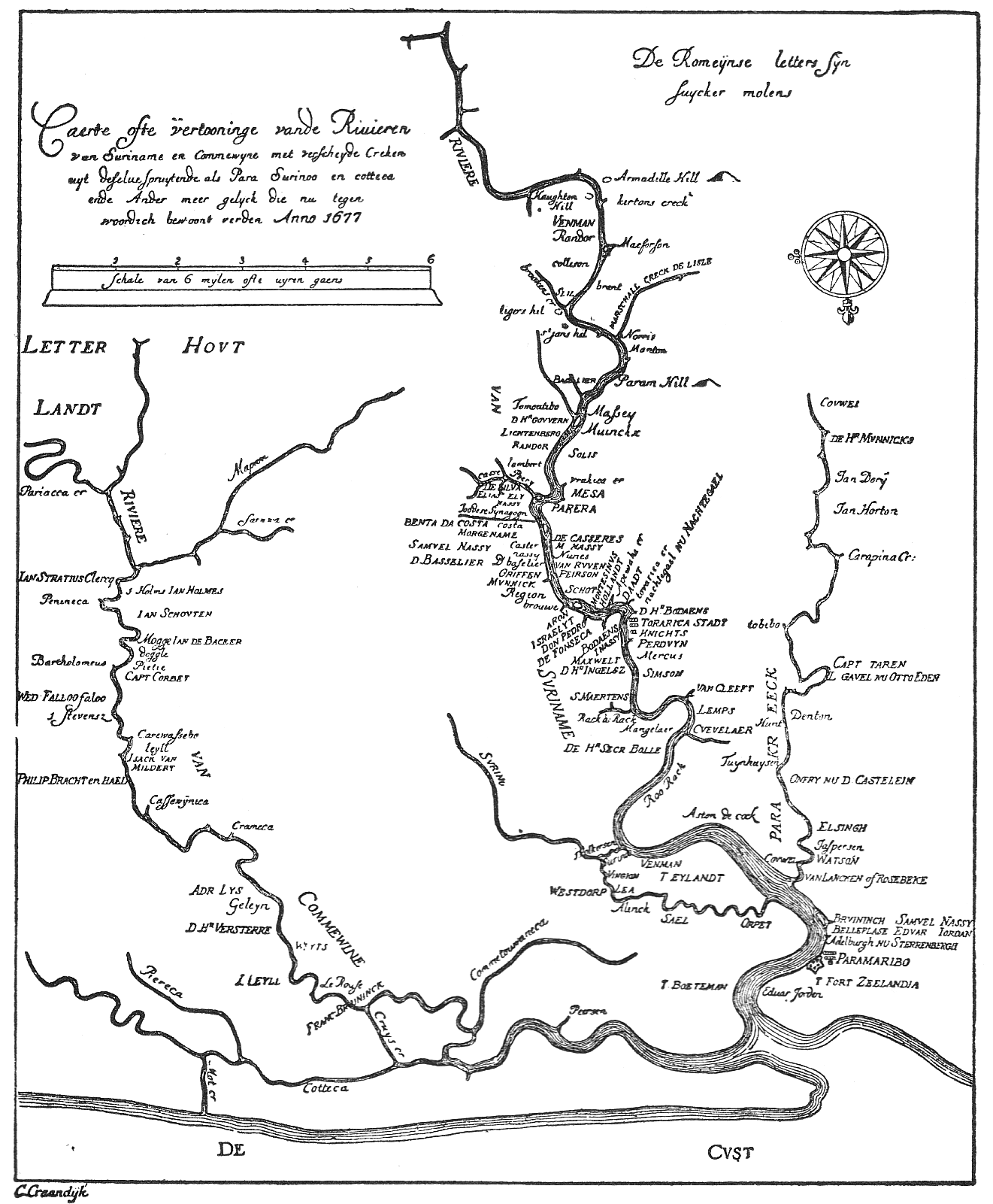 Door Willem Mogge getekende kaart van Suriname (1671/1677)